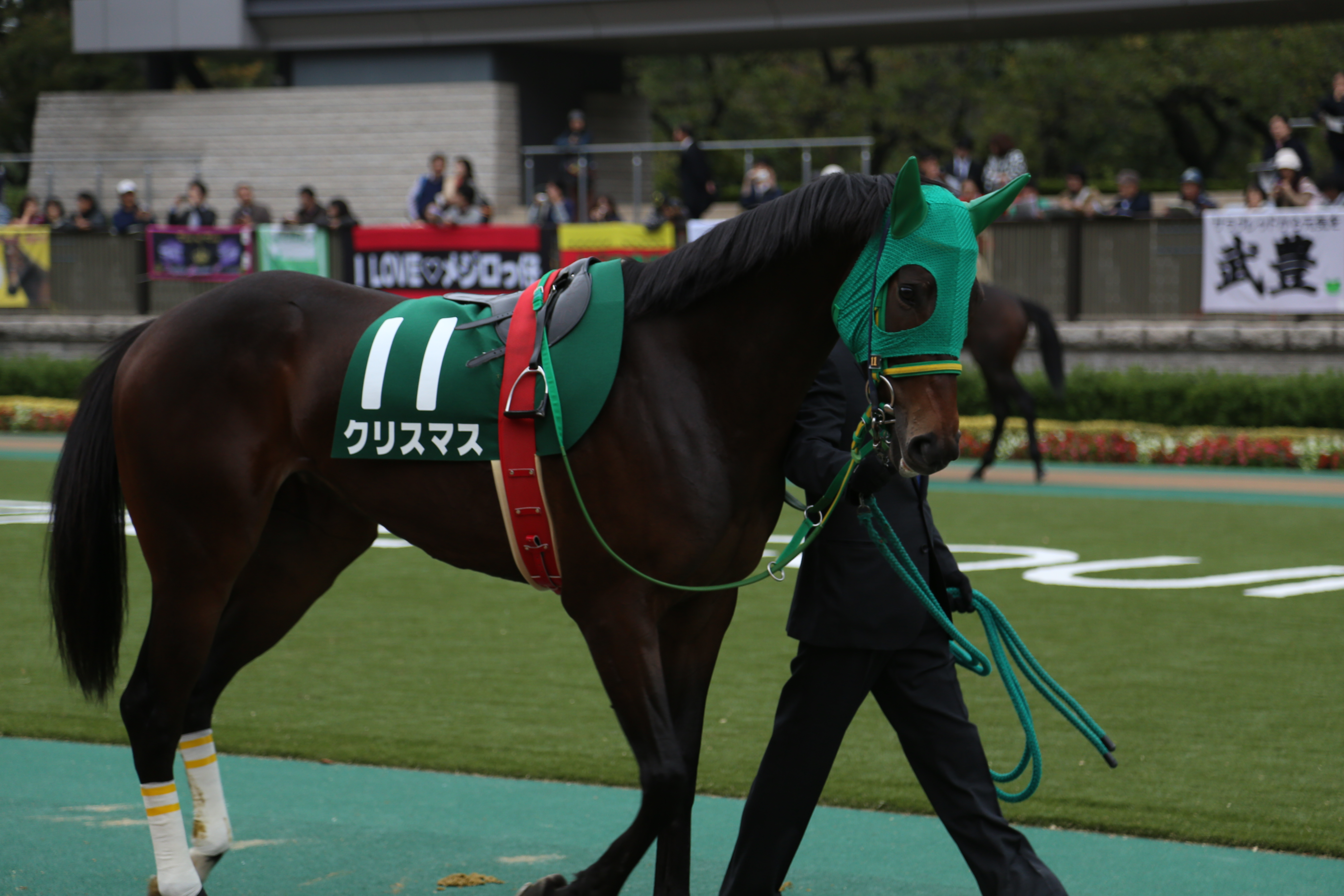 2013年11月2日 アルテミスステークス